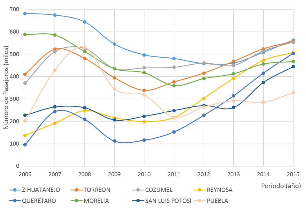 Gráfico comparación de la evolución de los aeropuertos según el número de pasajeros totales (entre 300, 000 y 600, 000) en el periodo 2006 a 2015